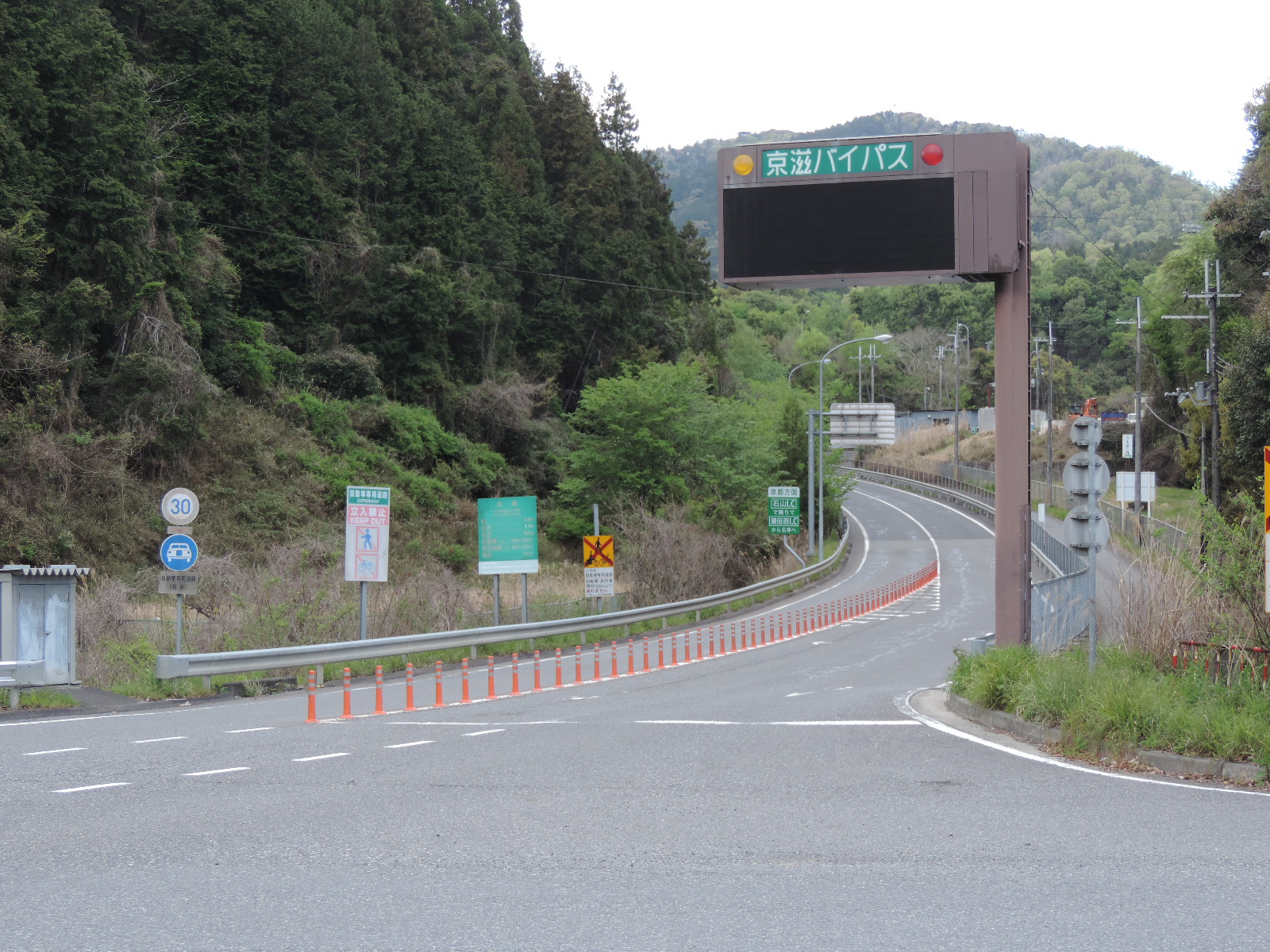 南郷IC（2020年5月撮影）